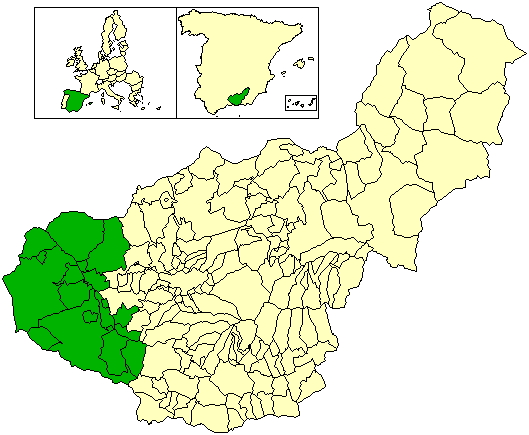 Mapa del partido judicial de Loja, en la provincia de Granada (España)